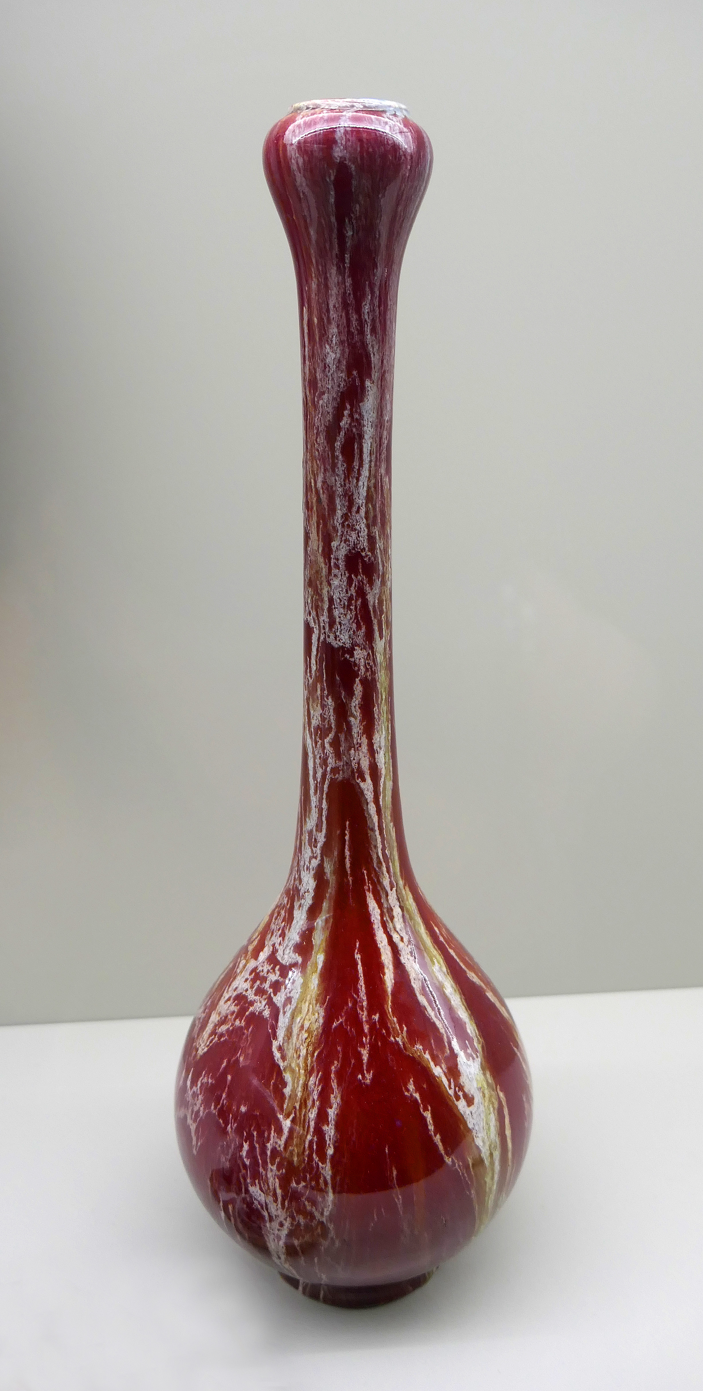 Théodore Deck. Keulenförmige Vase. Paris, um 1895. Porzellan, glasiert. Leipzig. Grassimuseum - Museum für angewandte Kunst.